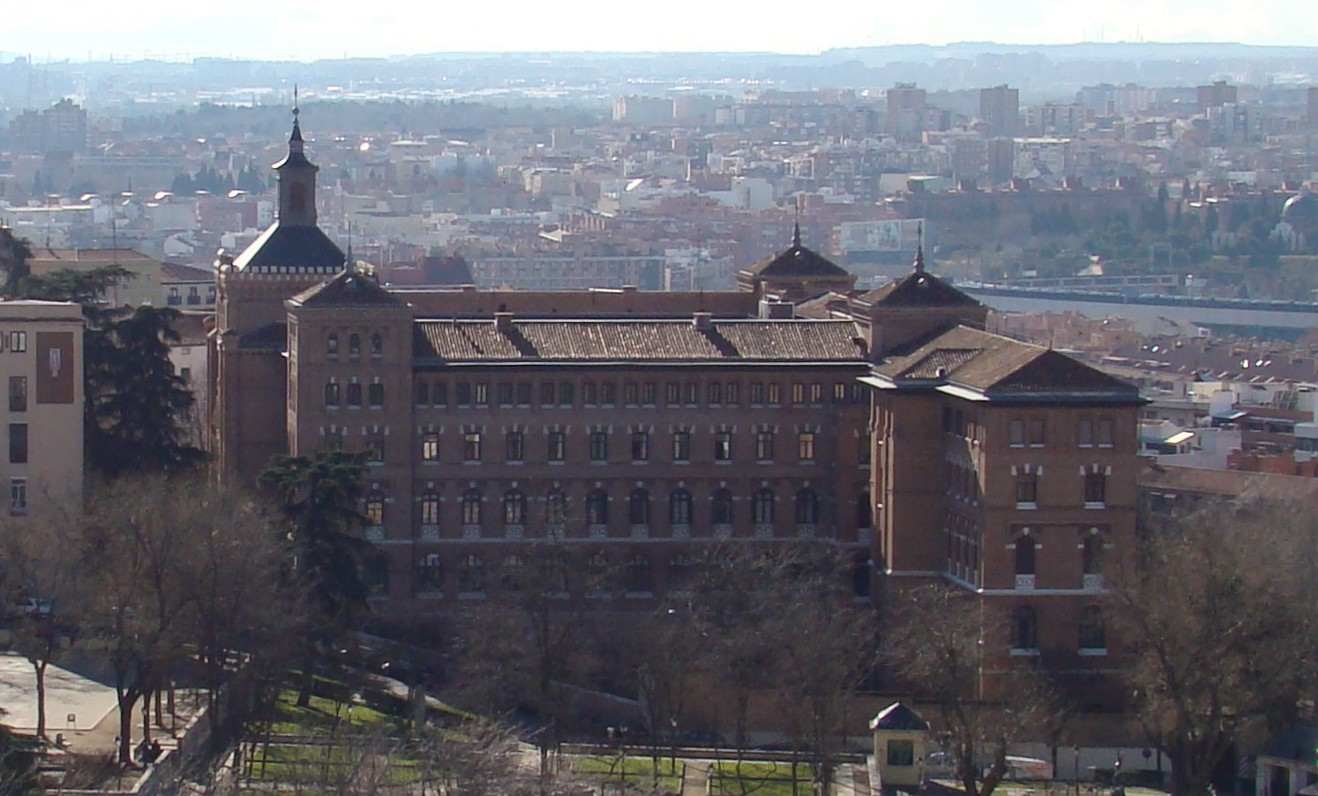 El reflejo es natural